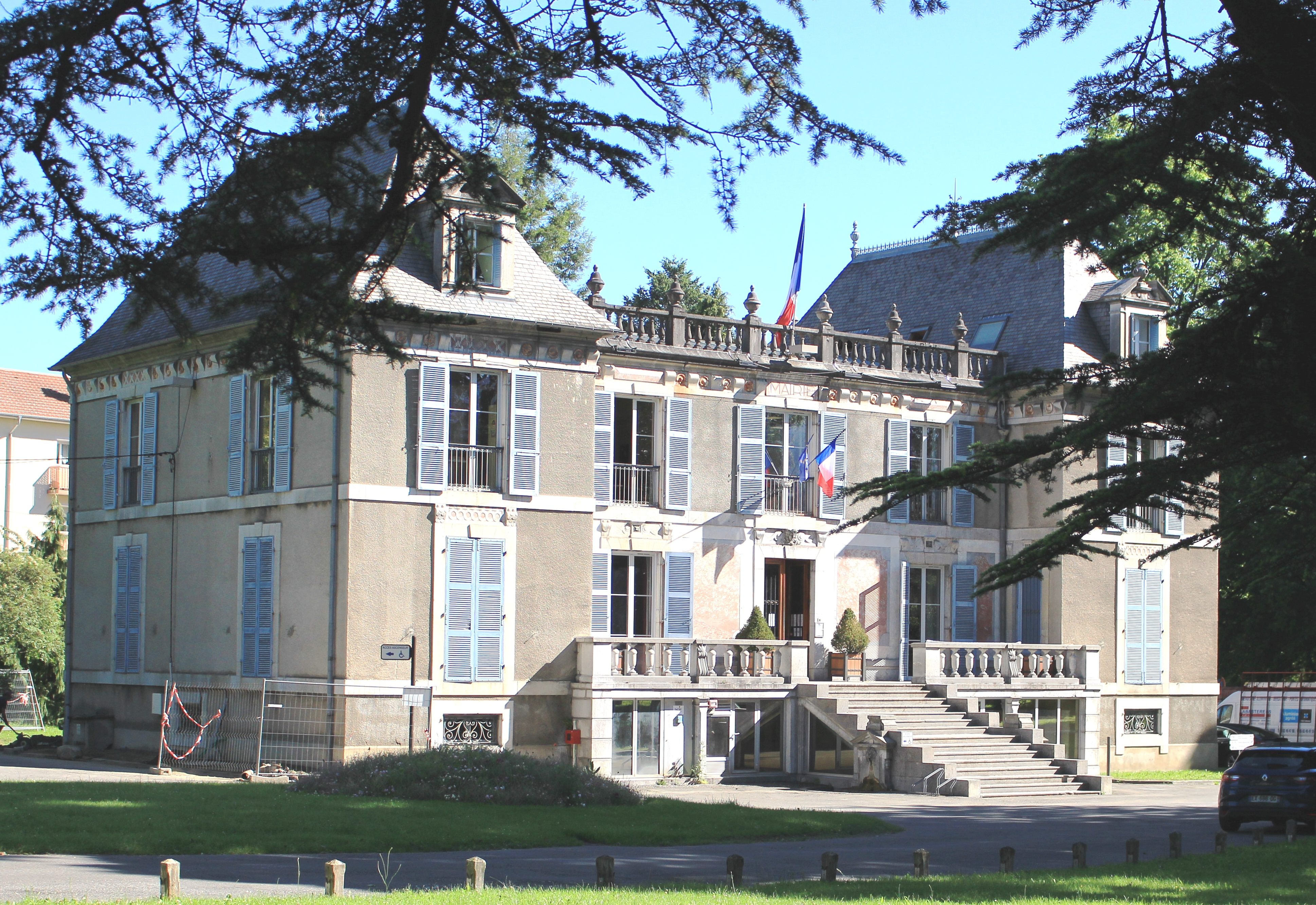 Mairie de Bagnères-de-Bigorre (Hautes-Pyrénées)